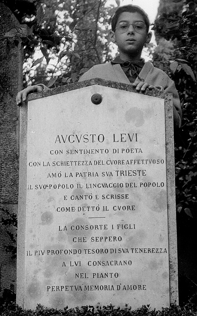 Silvio Benco, grande amico di Augusto Levi così scrisse per il suo epitaffio.